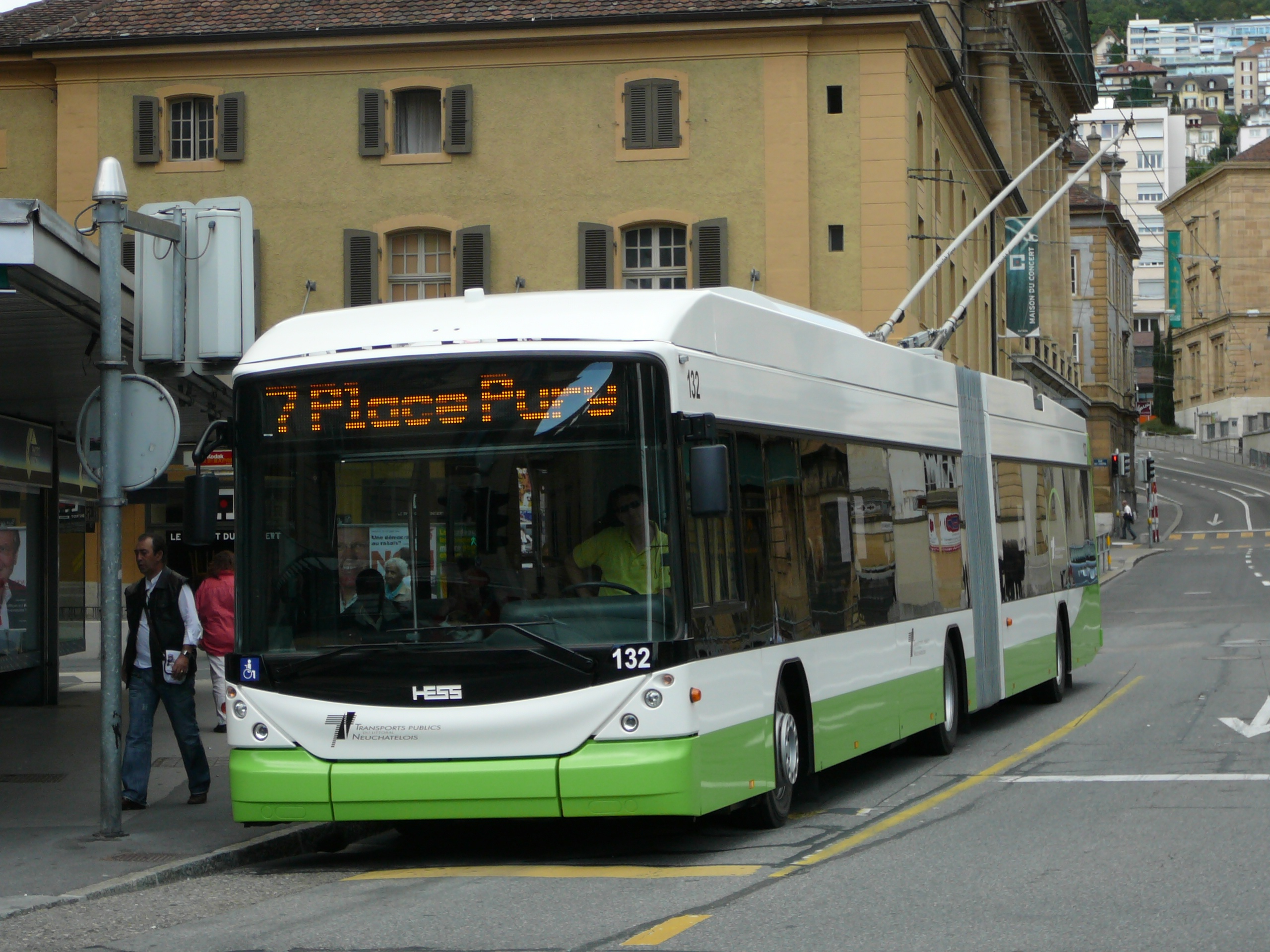 Trolleybus Hess Swisstrolley3 à l'arrêt St Honoré sur la ligne 7